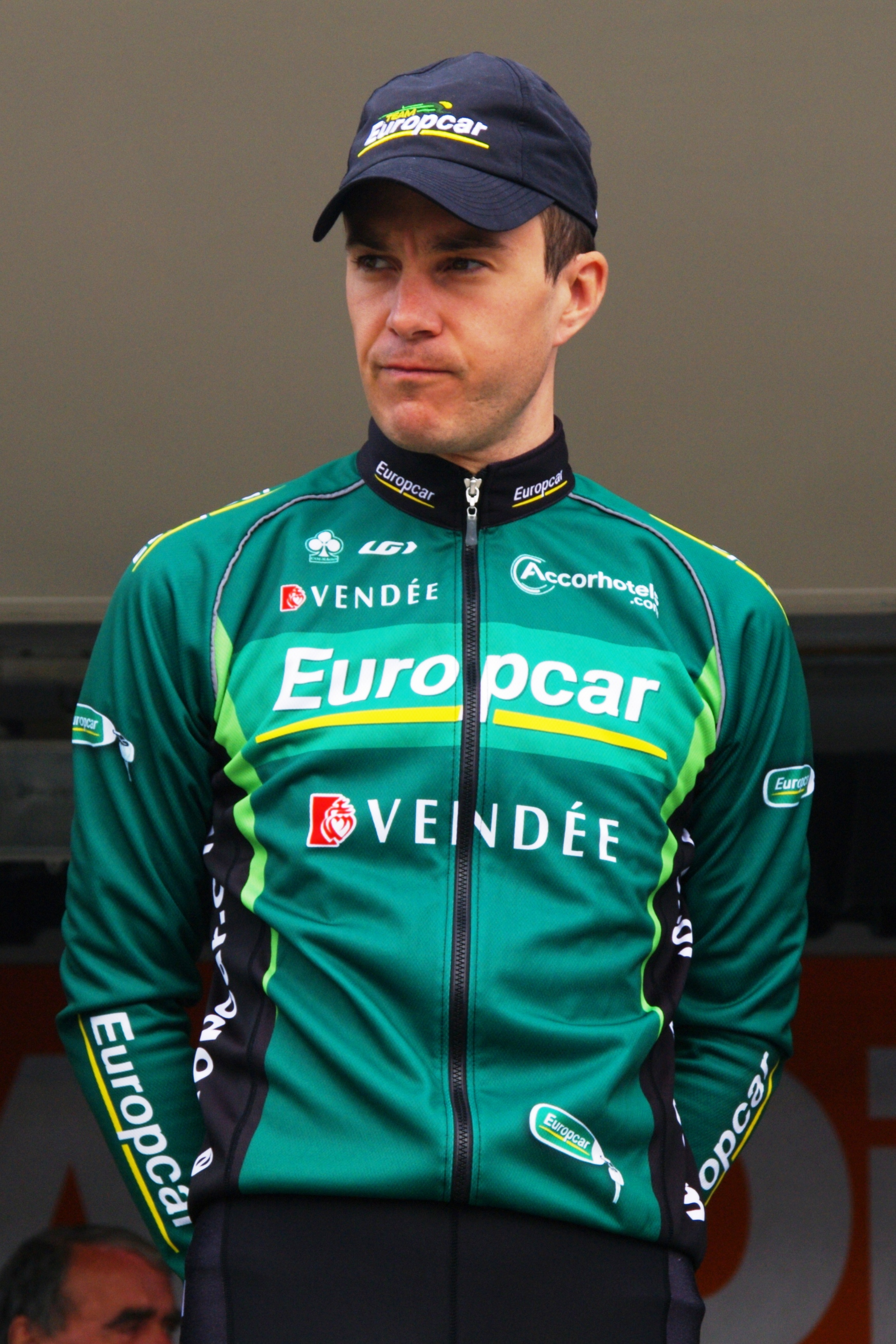 Christophe Kern lors de la présentation des équipes du Grand Prix de Denain 2011